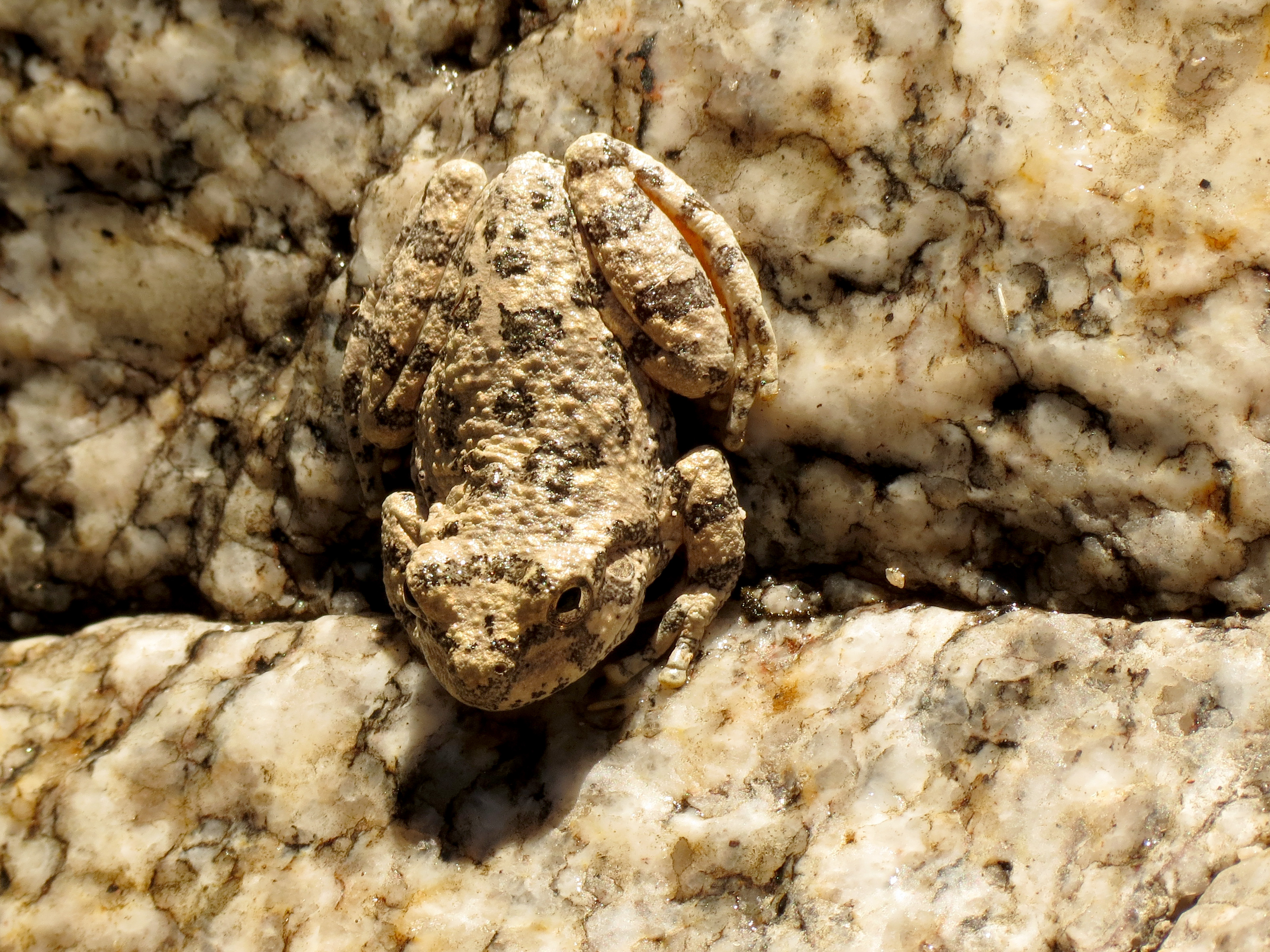 Hyla arenicolor. Molino Basin, Santa Catalina Mountains, Tucson, Arizona, USA.